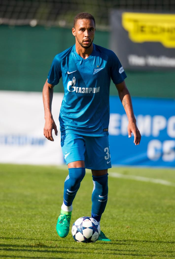 21.06.2017. Австрия, Гойнг-ам-Вильден-Кайзер. «Газпром»-тренировочные сборы в Австрии: товарищеский матч «Зенит» — ЦСКА (София).